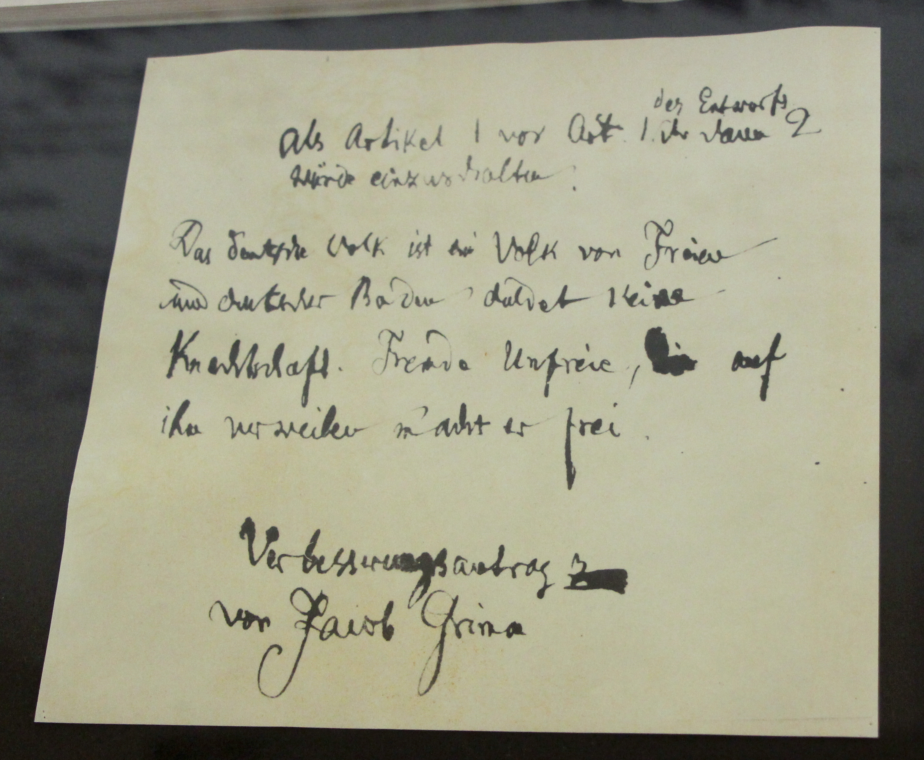 Erinnerungsstätte für die Freiheitsbewegungen in der deutschen Geschichte. "Als Artikel 1 vor Art. 1 des Entwurfes, der dann 2 würde, einzuschalten: Das deutsche Volk ist ein Volk von Freien und deutscher Boden duldet keine Knechtschaft. Fremde Unfreie, die auf ihm verweilen, macht er frei. Verbesserungsantrag von Jacob Grimm."